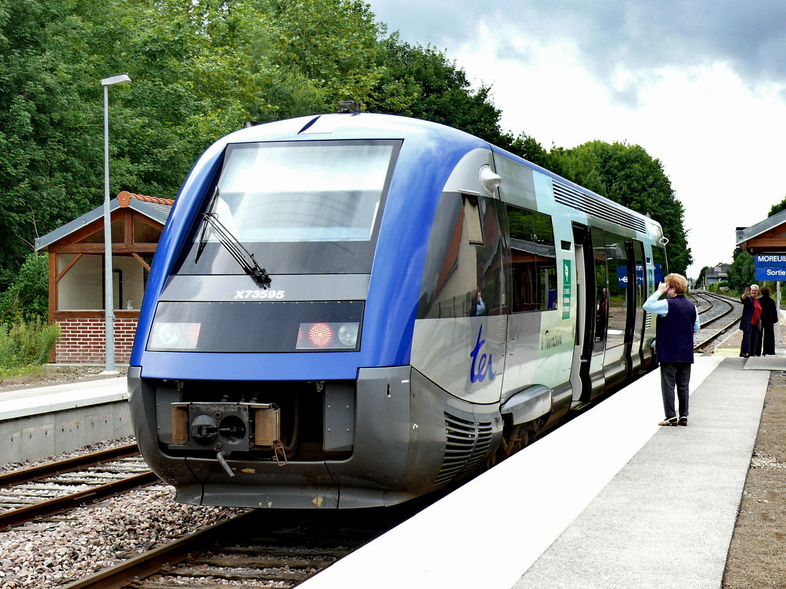 Autorail X 73595 en gare de Moreuil (Ligne Amiens - Compiègne).Autorail série X 73500